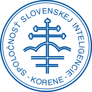 Logo Združenia slovenskej inteligencie Korene